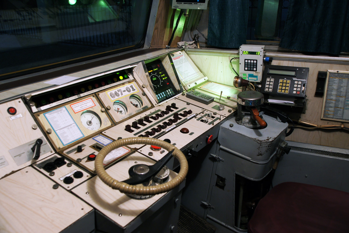 Кабина машиниста головного вагона №01 электропоезда ЭТ2М-067